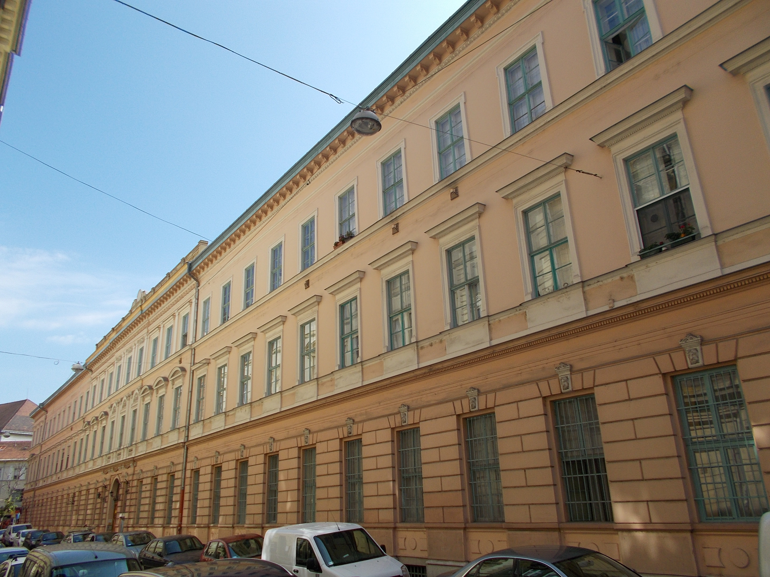 Kétemeletes, eklektikus sarokház. Gönczy Pál utcai homlokzat. Frey Lajos és Kauser Lipót építészek, 1870. 1040 - Budapest, Gönczy Pál utca 1-3., Lónyai utca 7., Csarnok tér . This is a photo of a monument in Hungary, Identifier: 1040